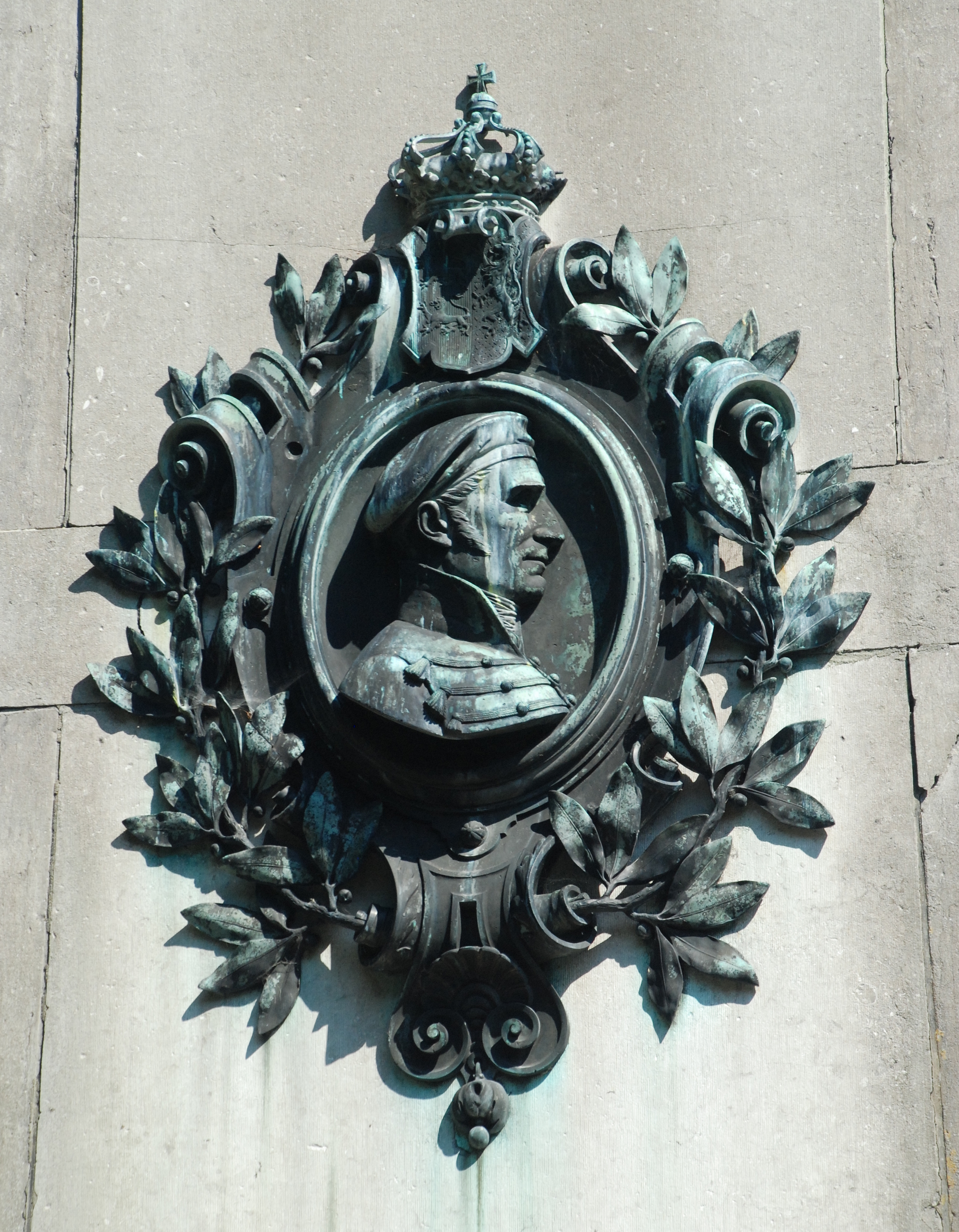 Belgique - Brabant wallon - Monument Brunswick (Genappe)